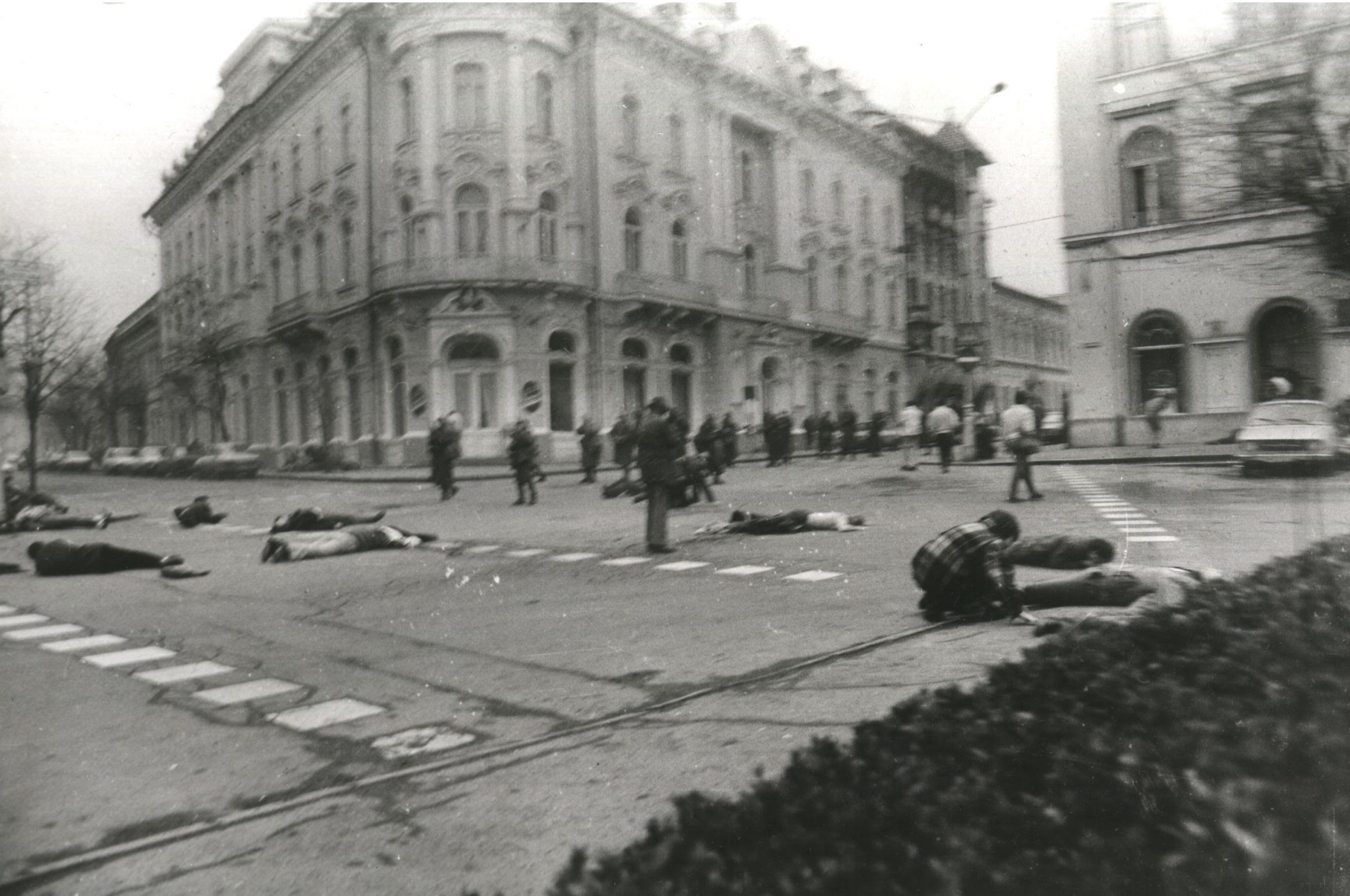 Această poză a fost realizată de către Răzvan Rotta în zilele revoluţiei din 1989. Cătălin Bogdan a cerut acestuia să transmită în domeniu public cele 21 de poze iar dânsul şi-a dat acordul; ulterior acest acord de publicare a fost trimis confirmat către d-nul Rotta, pe data de 5 aprilie 2010, la adresa - vezi tichetul 2010032110014341)